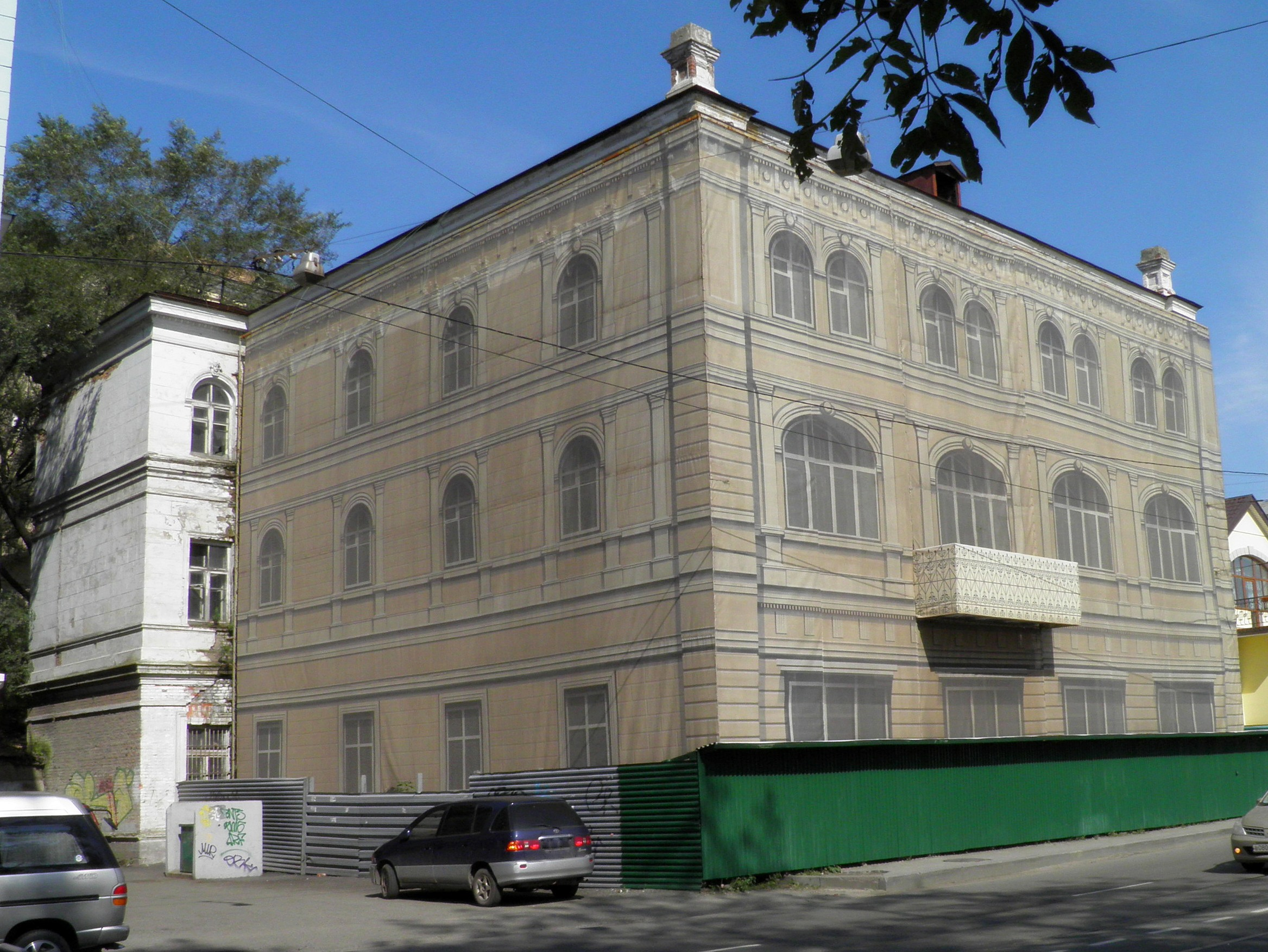 Библиотека имени Гоголя - первая на Дальнем Востоке публичная библиотека. Время постройки - 1902 -1913 гг. г. Владивосток улица Светланская дом 119. в настоящий момент здание заброшено.